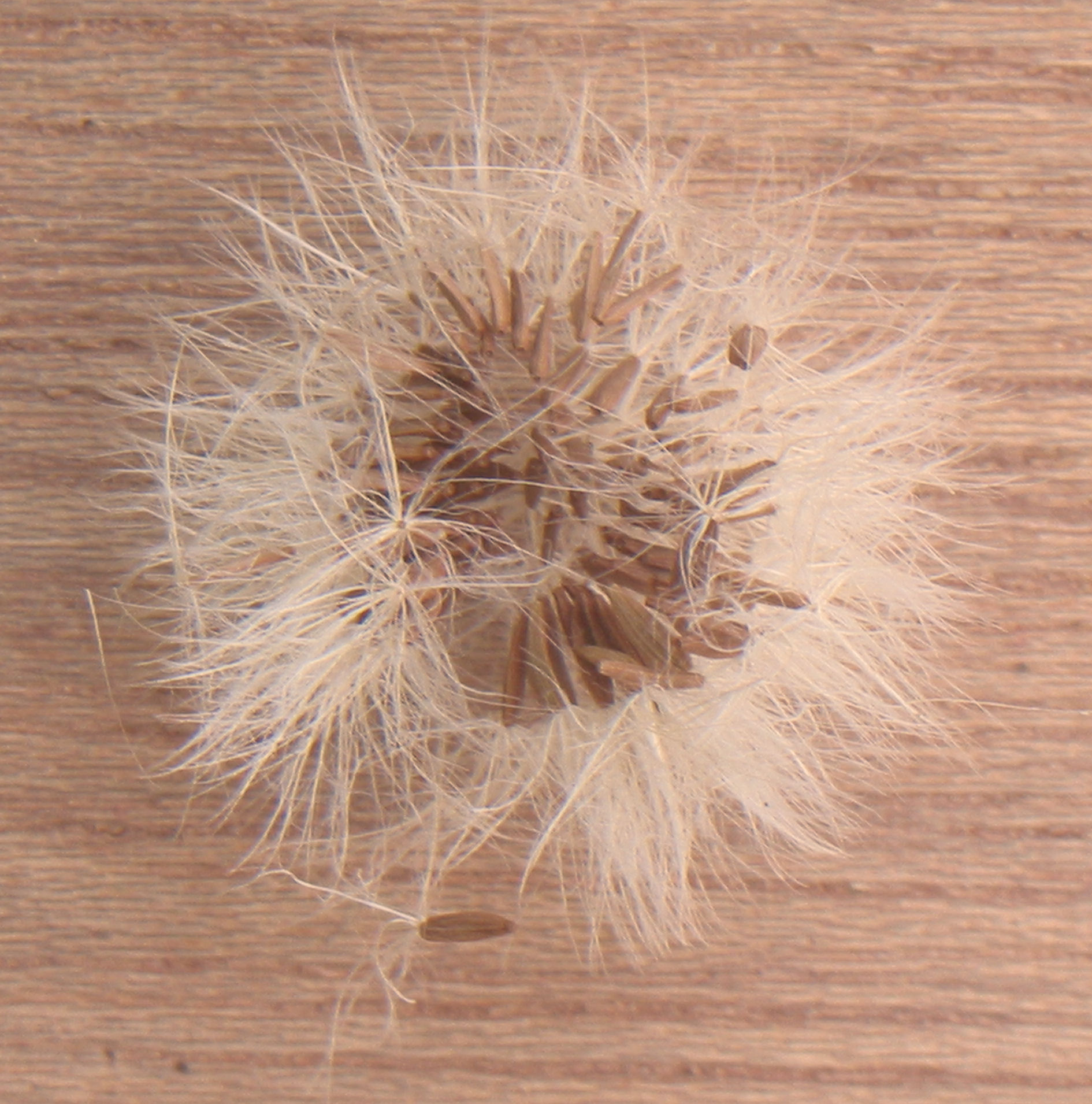 (Gewone melkdistel zaadpluis) Sonchus oleraceus seeds